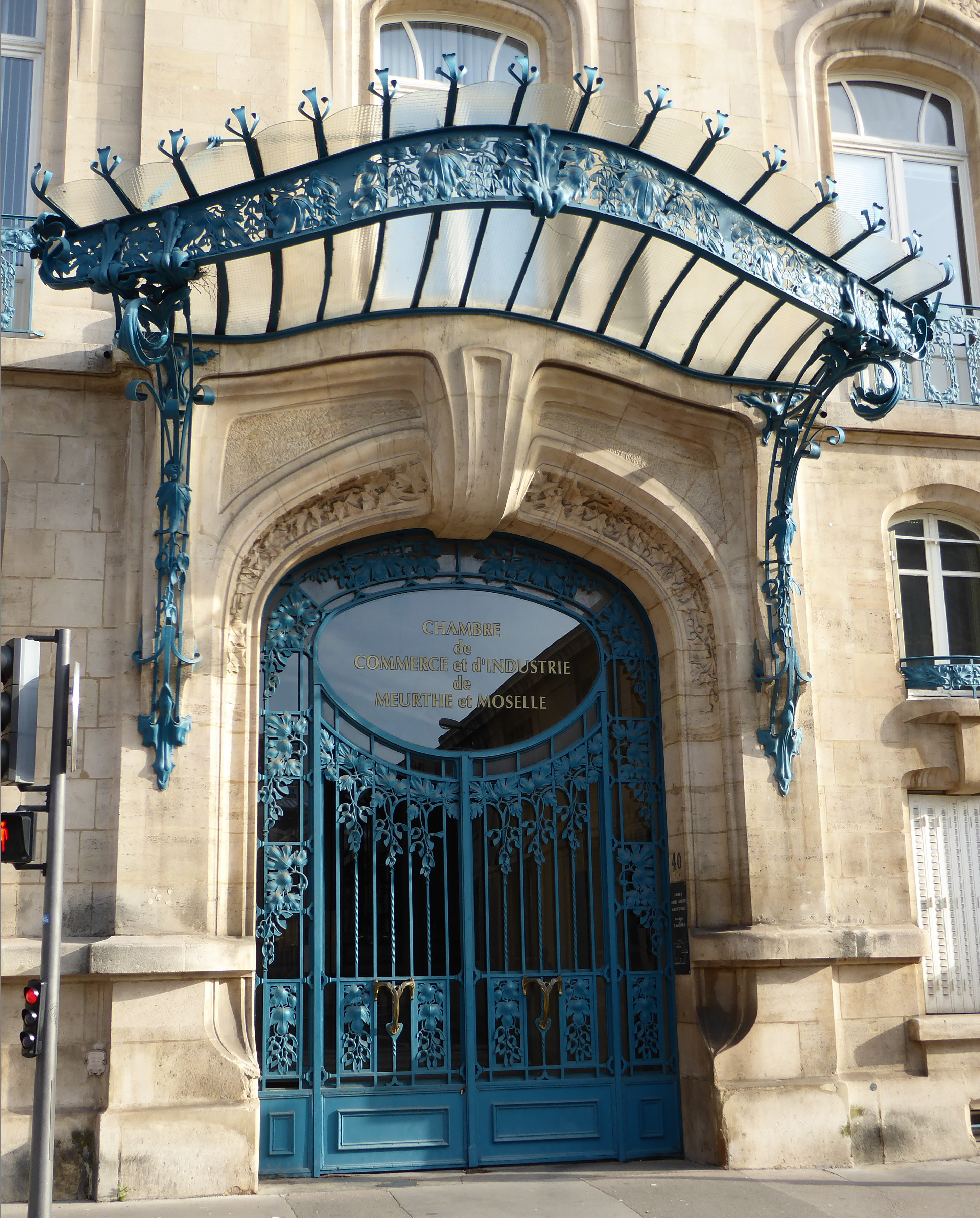 Marquise et porte de la chambre de commerce et d'industrie à Nancy.